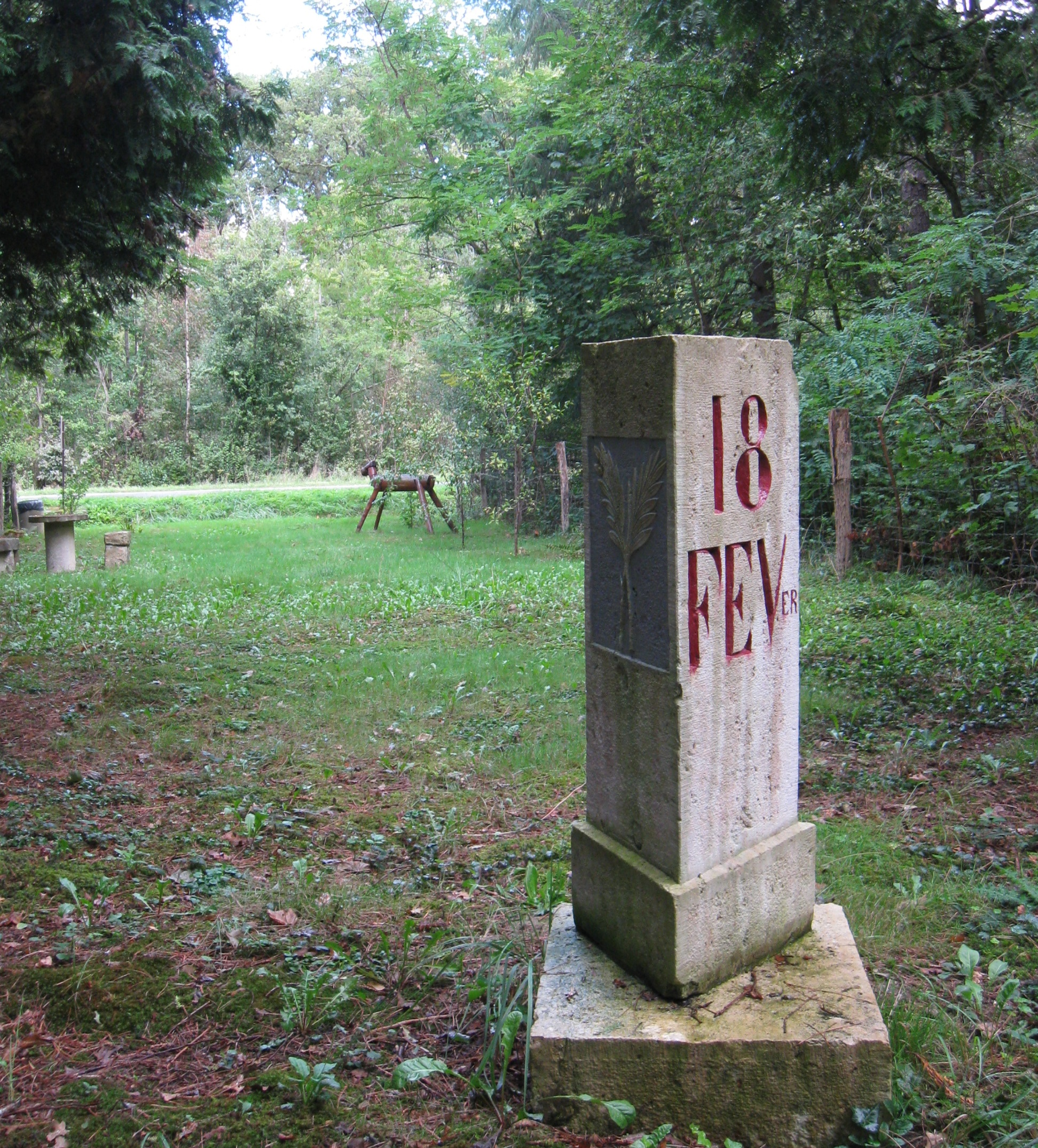 Stèle commémorant le passage de Napoléon le 18 février 1814 érigée en 1888 par le comte d'Haussonville.